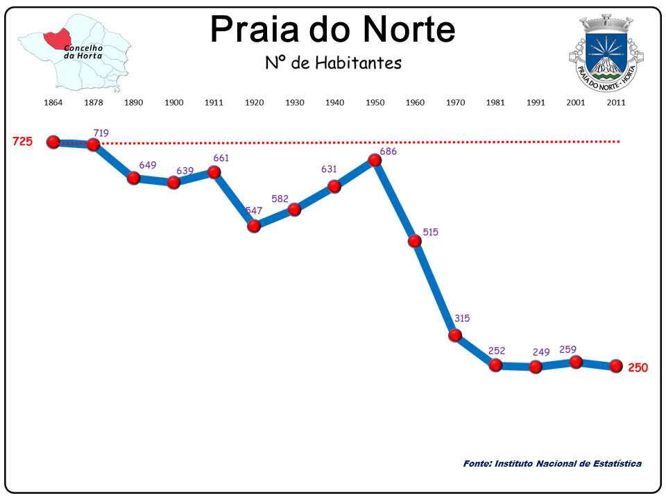 População